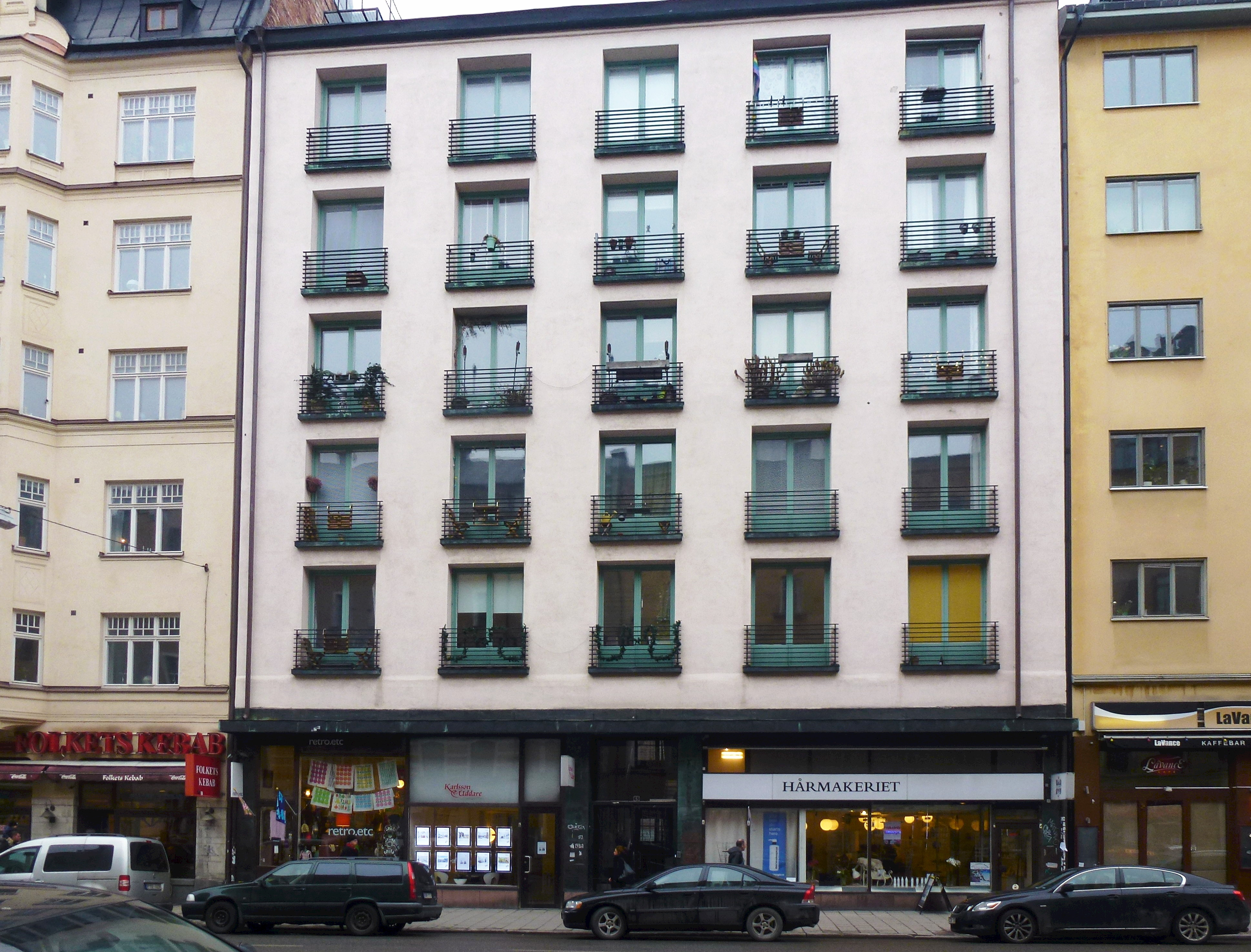 "Franska huset", Folkungagatan 65, arkitekt Paul Hedqvist